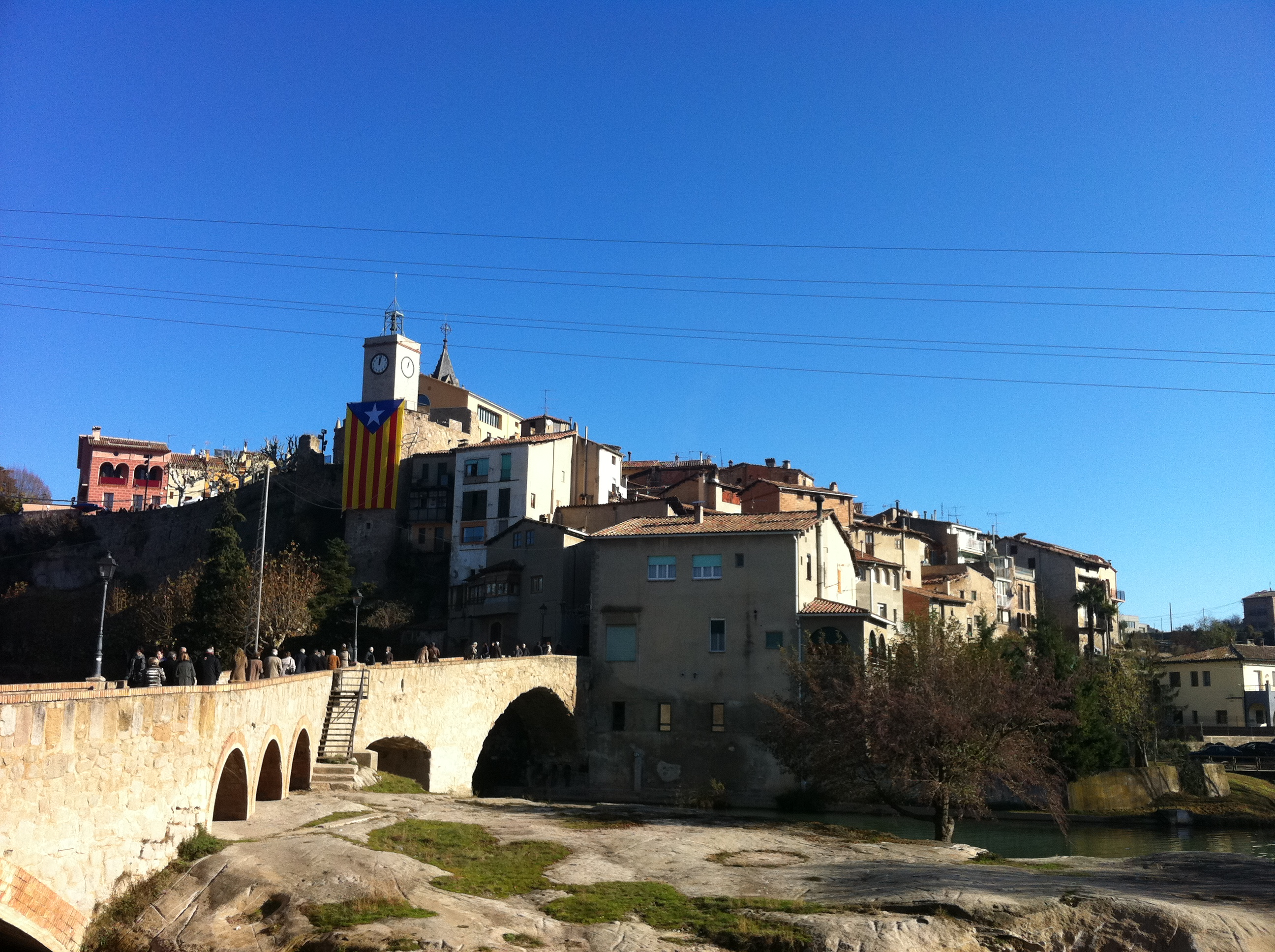 Vista del pont vell de Gironella i el nucli antic de la vila.